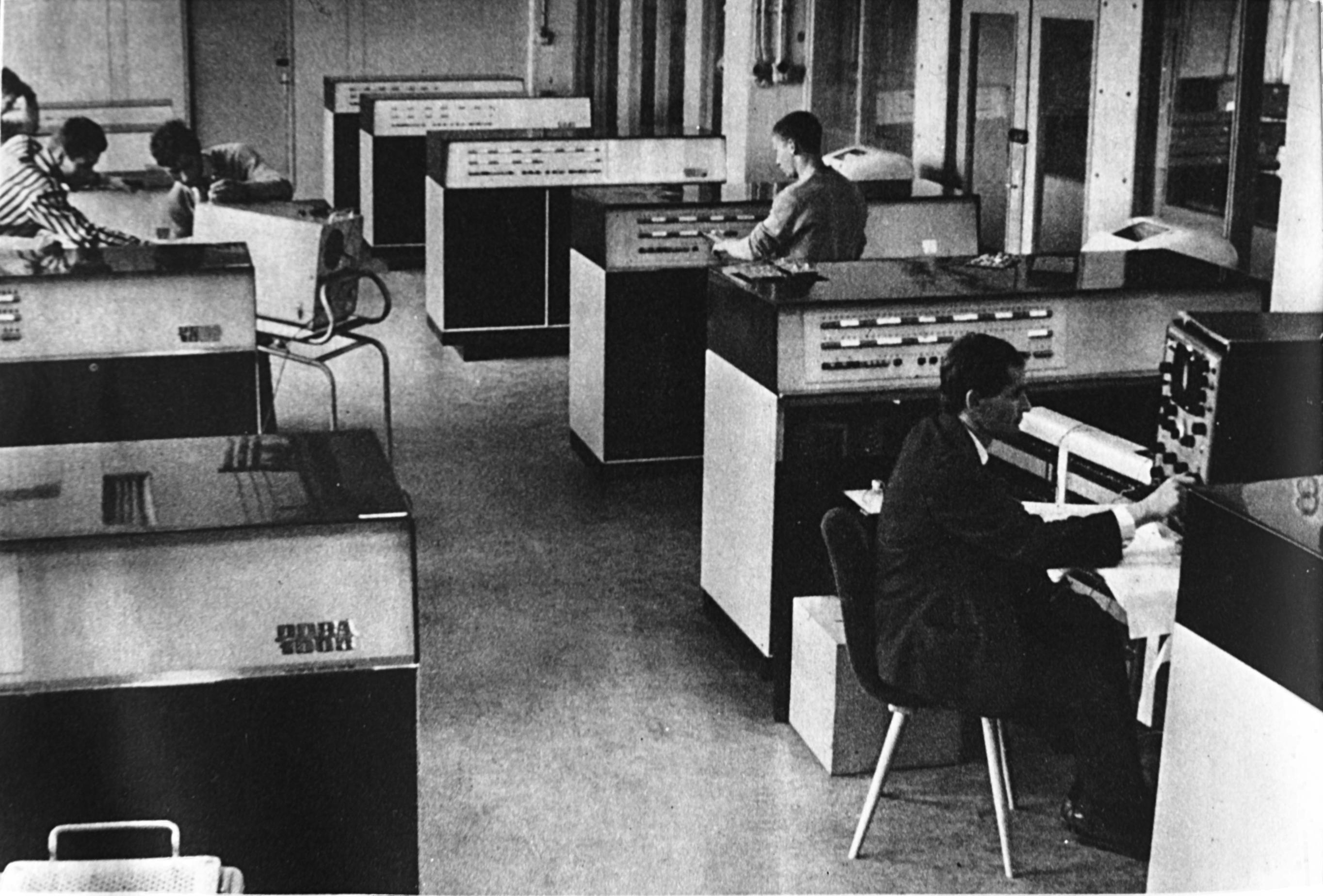 Eksploatacja wstempna komputerów Odra 1003